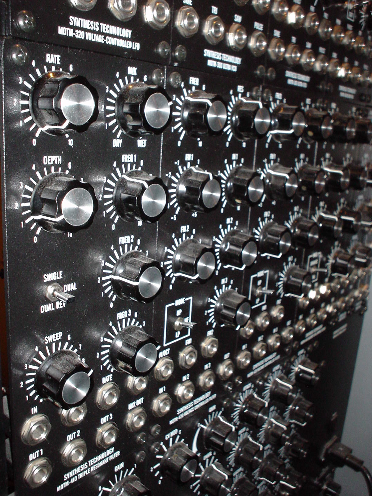 2 May 2004 my synth